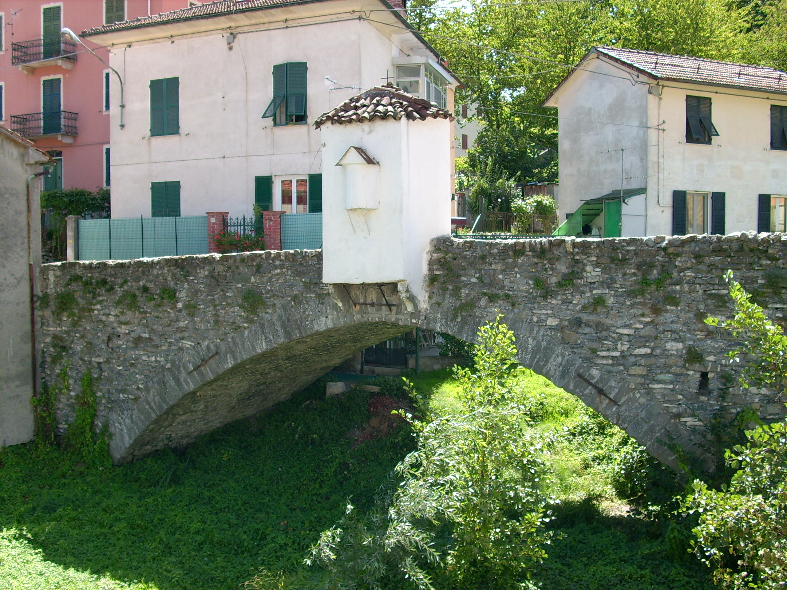 Ponte presso Ronco Scrivia, Liguria, Italia